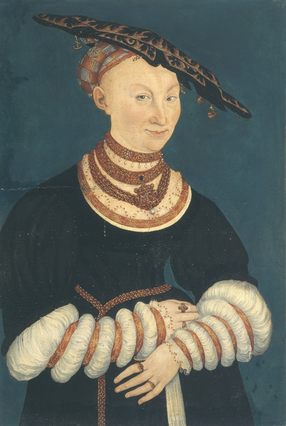 Herzogin Katharina von Mecklenburg, Gemahlin Herzog Heinrich des Frommen von Sachsen (1487- 1561)